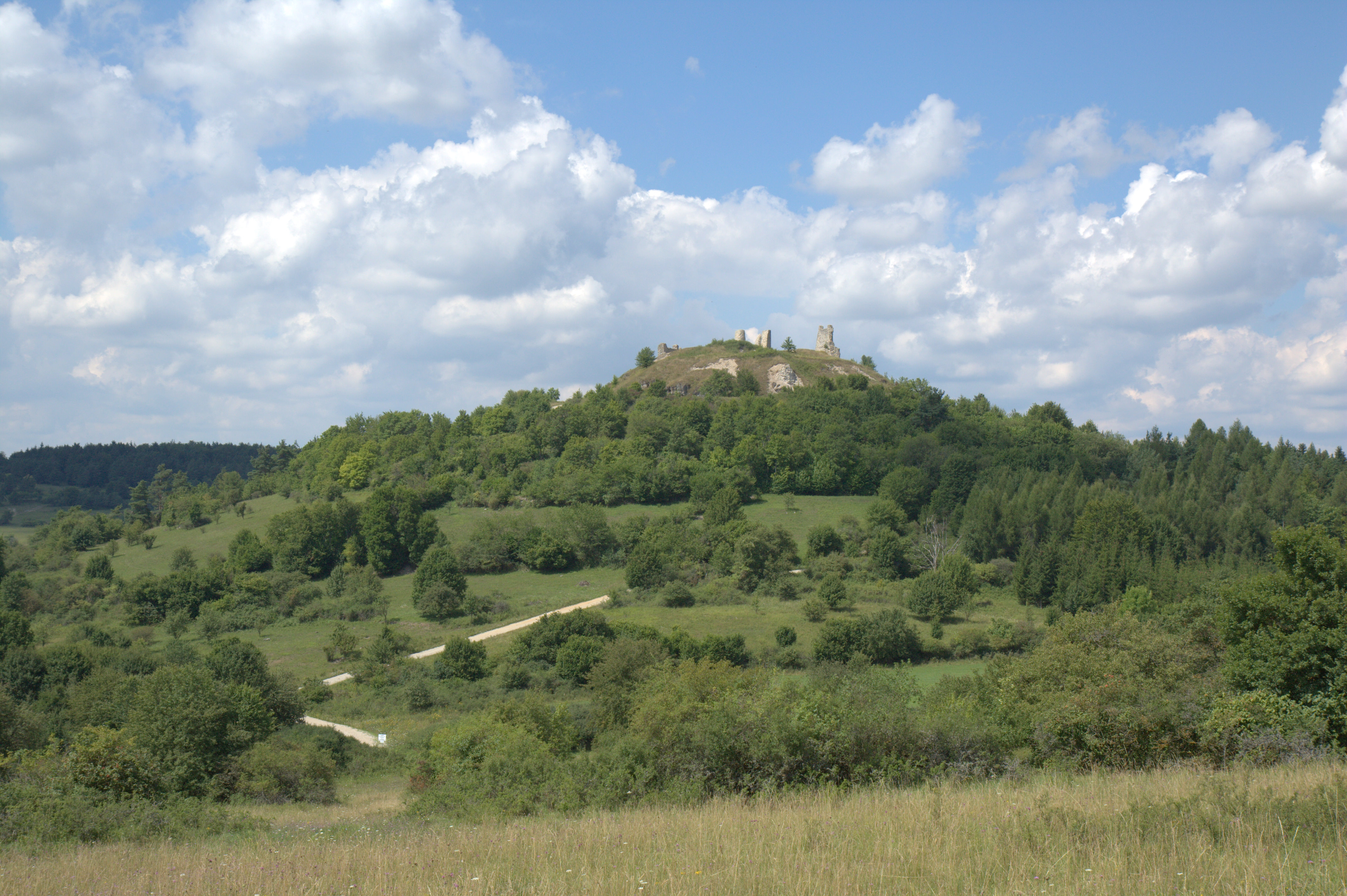 Burgruine Hohenburg aus südöstlicher Richtung